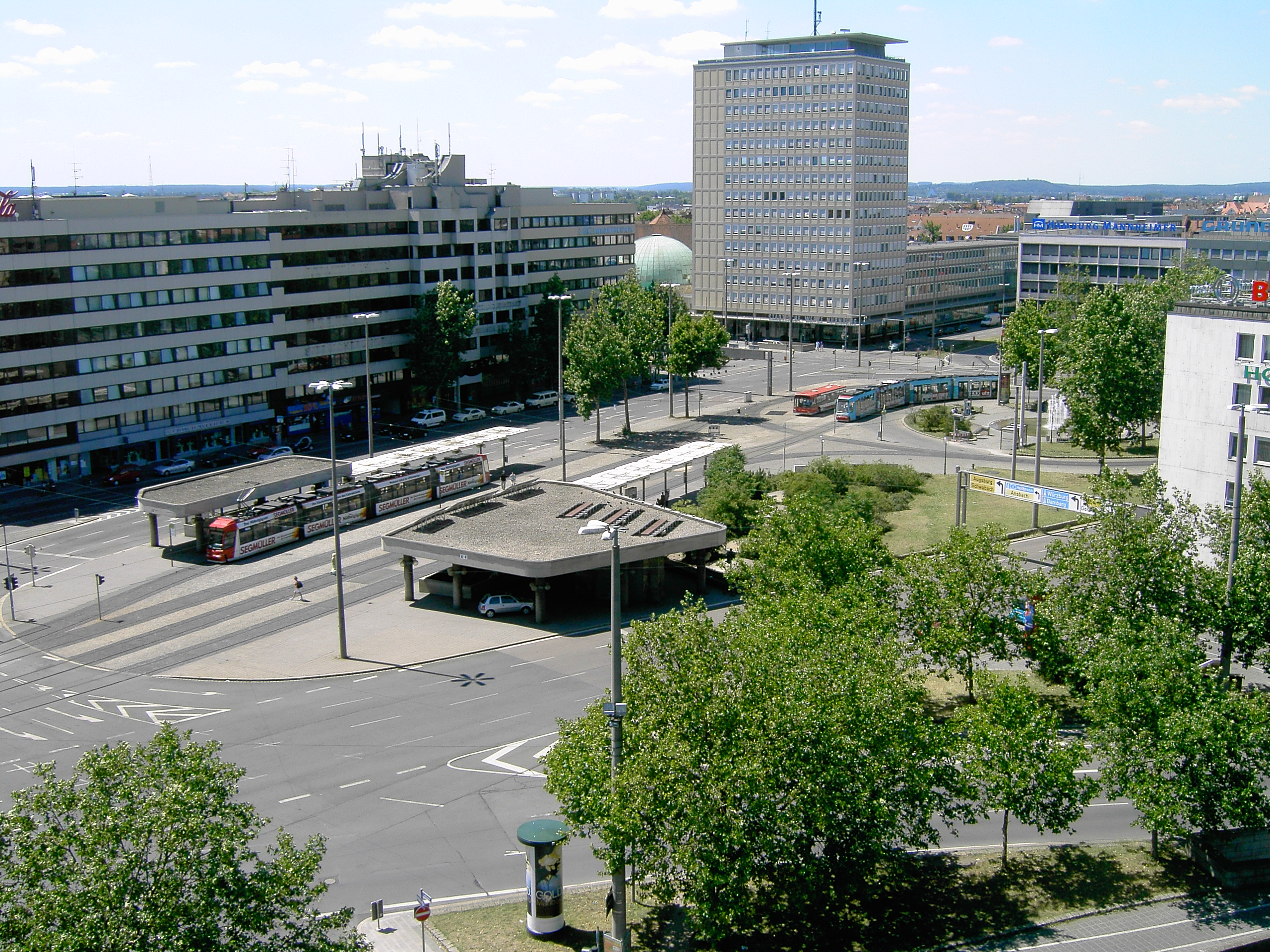 Der Nürnberger Plärrer, gesehen vom Spittlertorturm. Im Hintergrund das Hochhaus der Elektrizitäts- und Wasserversorgung "N-Ergie". Das in den Jahren 1952/53, nach den Entwürfen des Architekten Wilhelm Schlegtendals, erbaute Gebäude steht seit 1988 unter Denkmalschutz. Interessant ist, dass sich das 56 M hohe Gebäude nach oben hin verjüngt. Links davon ist die Rundkuppel des Nikolaus Kopernikus Planetarium zu sehen.